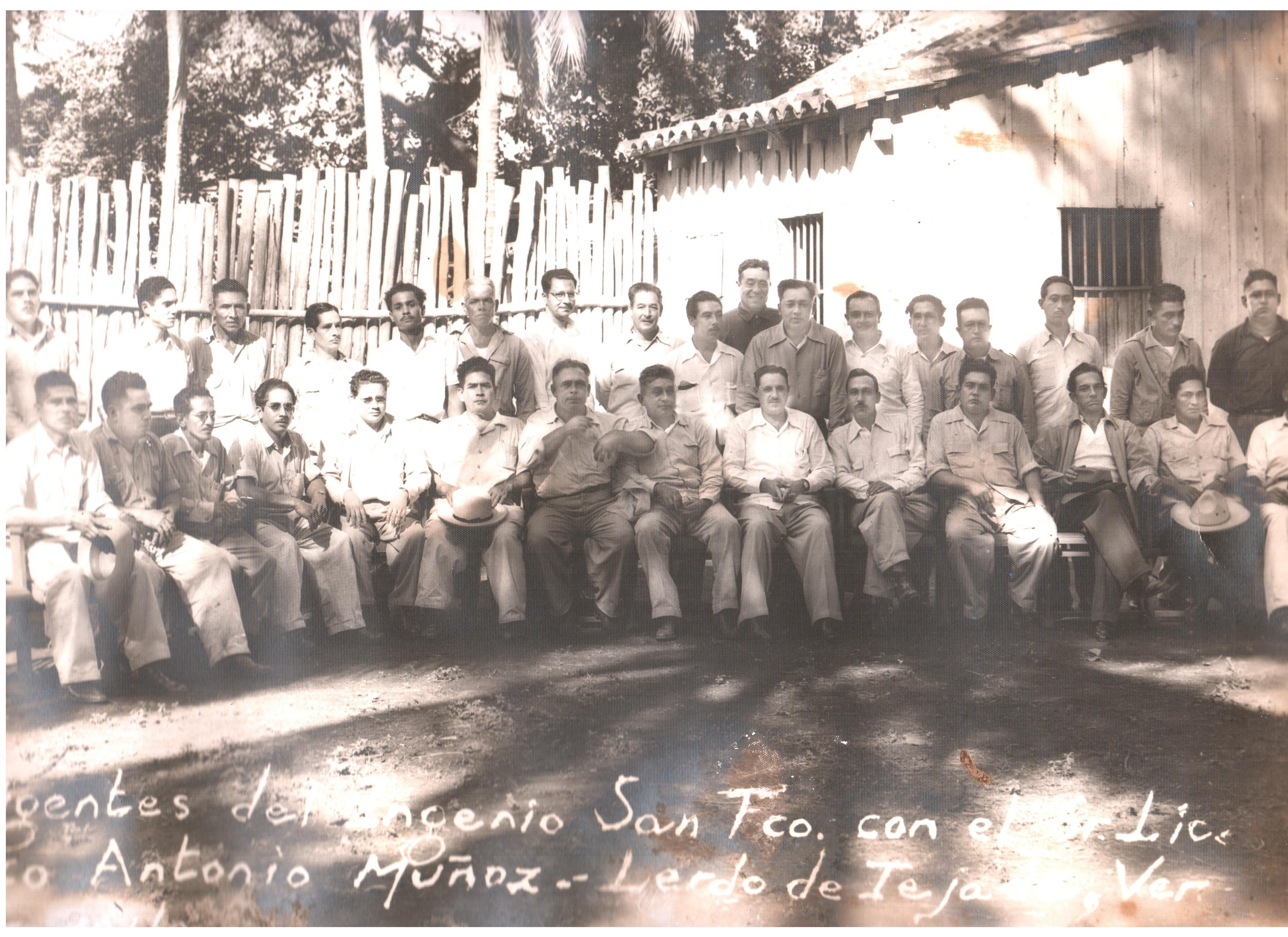 Fotografía de dirigentes del Ingenio San Francisco con el Lic. Marco Antonio Muñoz Turbull.- Lerdo de Tejada, Ver. Aparece Don Emilio Bustamante Aragon hermano del ex-Gobernador de Morelos Don José Refugio Bustamante Aragon.